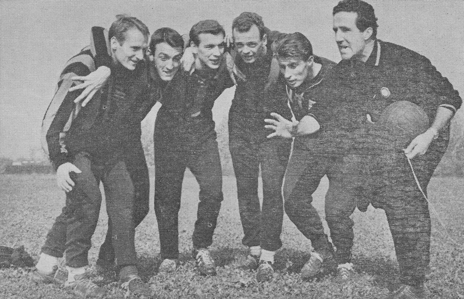 L'allenatore di calcio franco-argentino Helenio Herrera (a destra) all'Inter nella stagione 1960-61, in allenamento insieme ad alcuni calciatori nerazzurri.